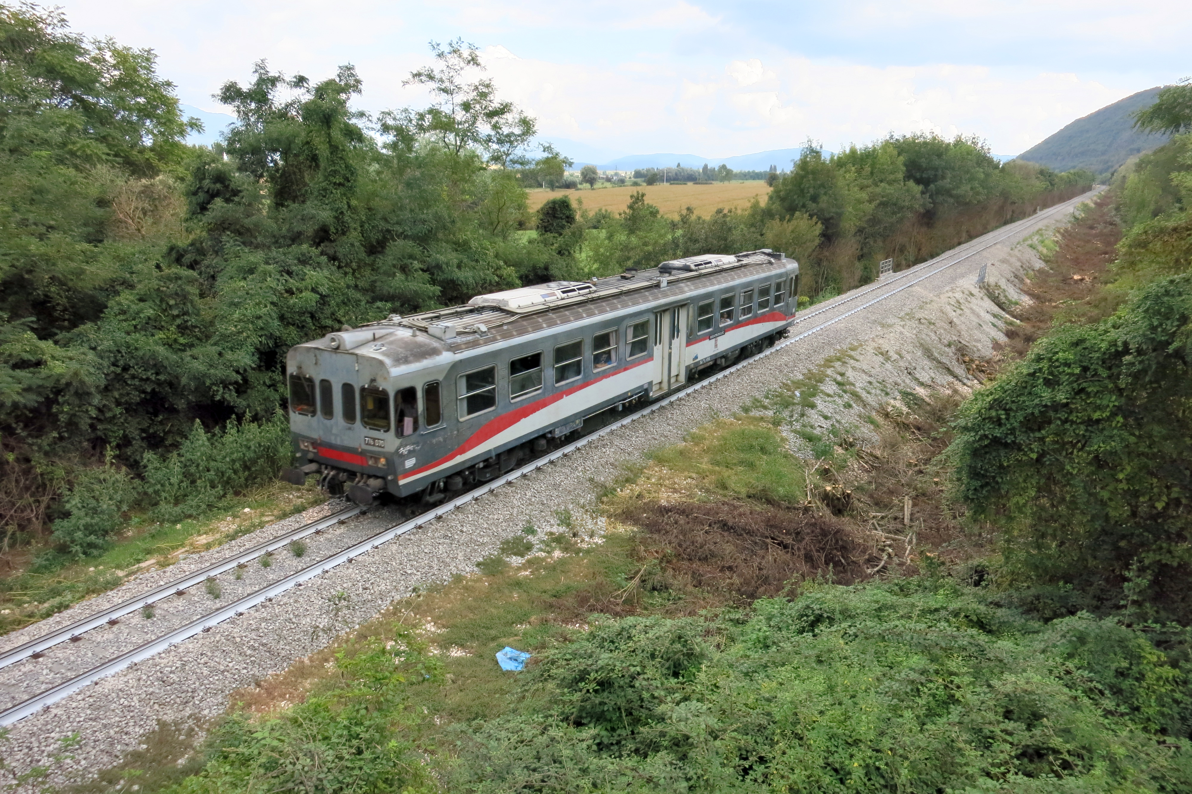 Automotrice ALn 776.070 di FCU in transito sulla ferrovia Terni-Rieti-L'Aquila-Sulmona, tra le stazioni di Greccio e Labro-Moggio, in direzione Terni. Foto scattata dal cavalcaferrovia che, dalla strada provinciale n. 1, porta al paese abbandonato di Repasto.